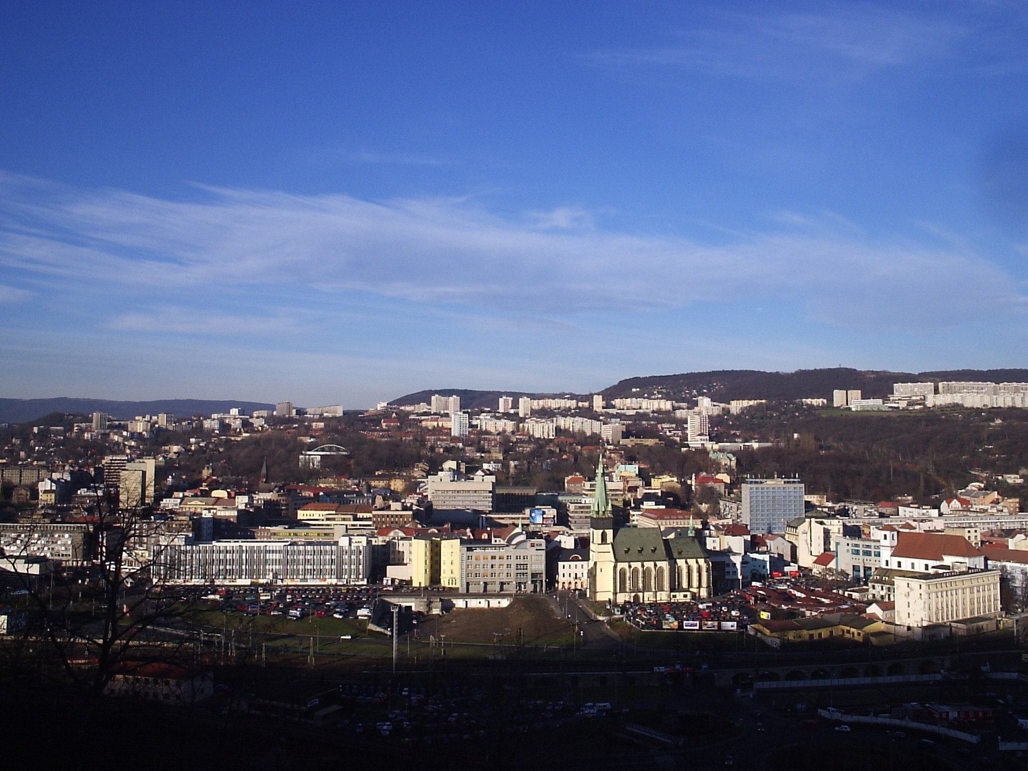 Usti nad Labem panorama panoramic